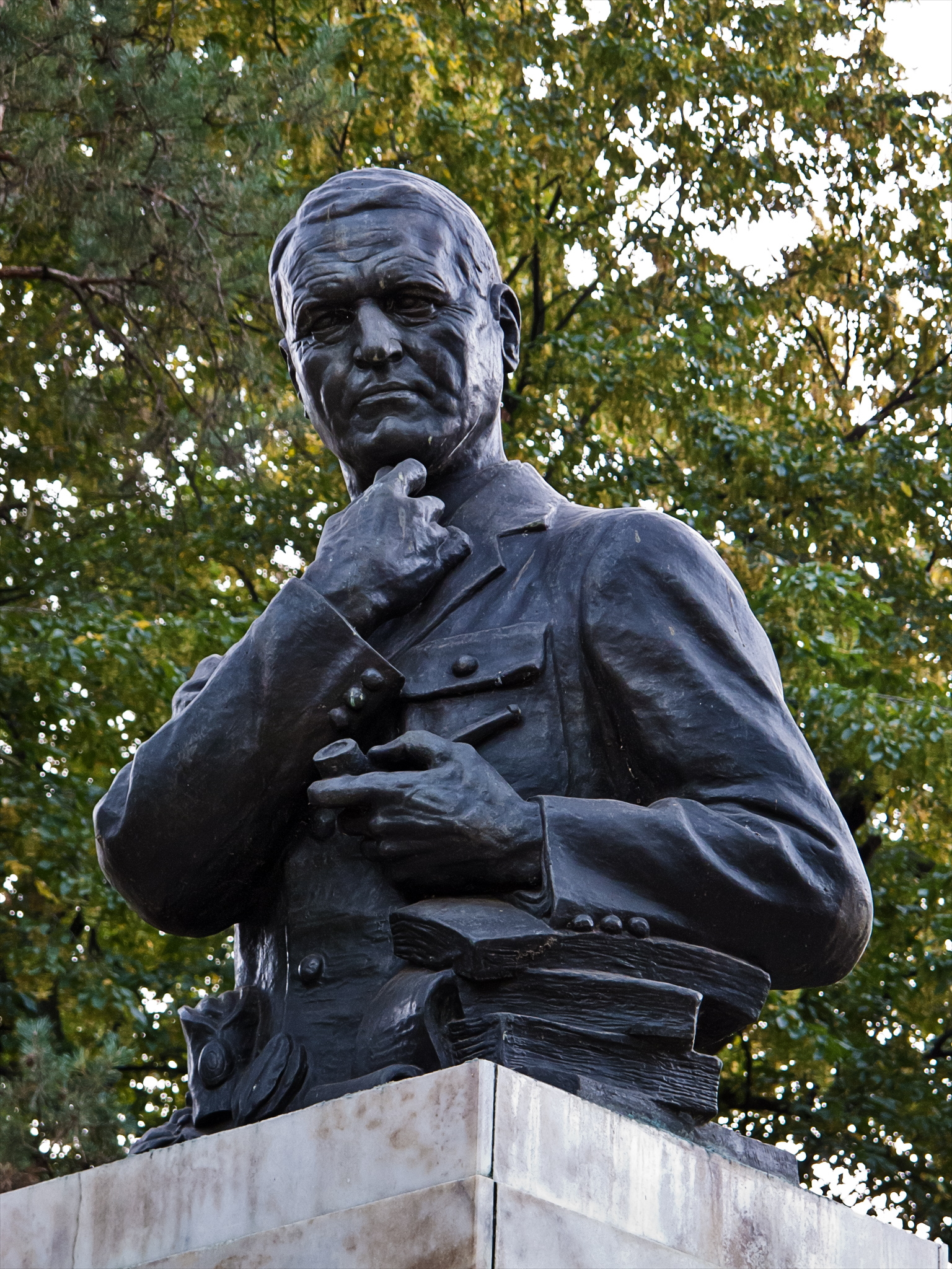 Споменик Арчибалду Рајсу (само биста крупније), Топчидерски парк, Београд, Србија